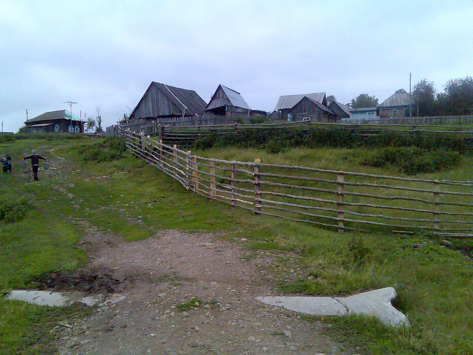 Аисово